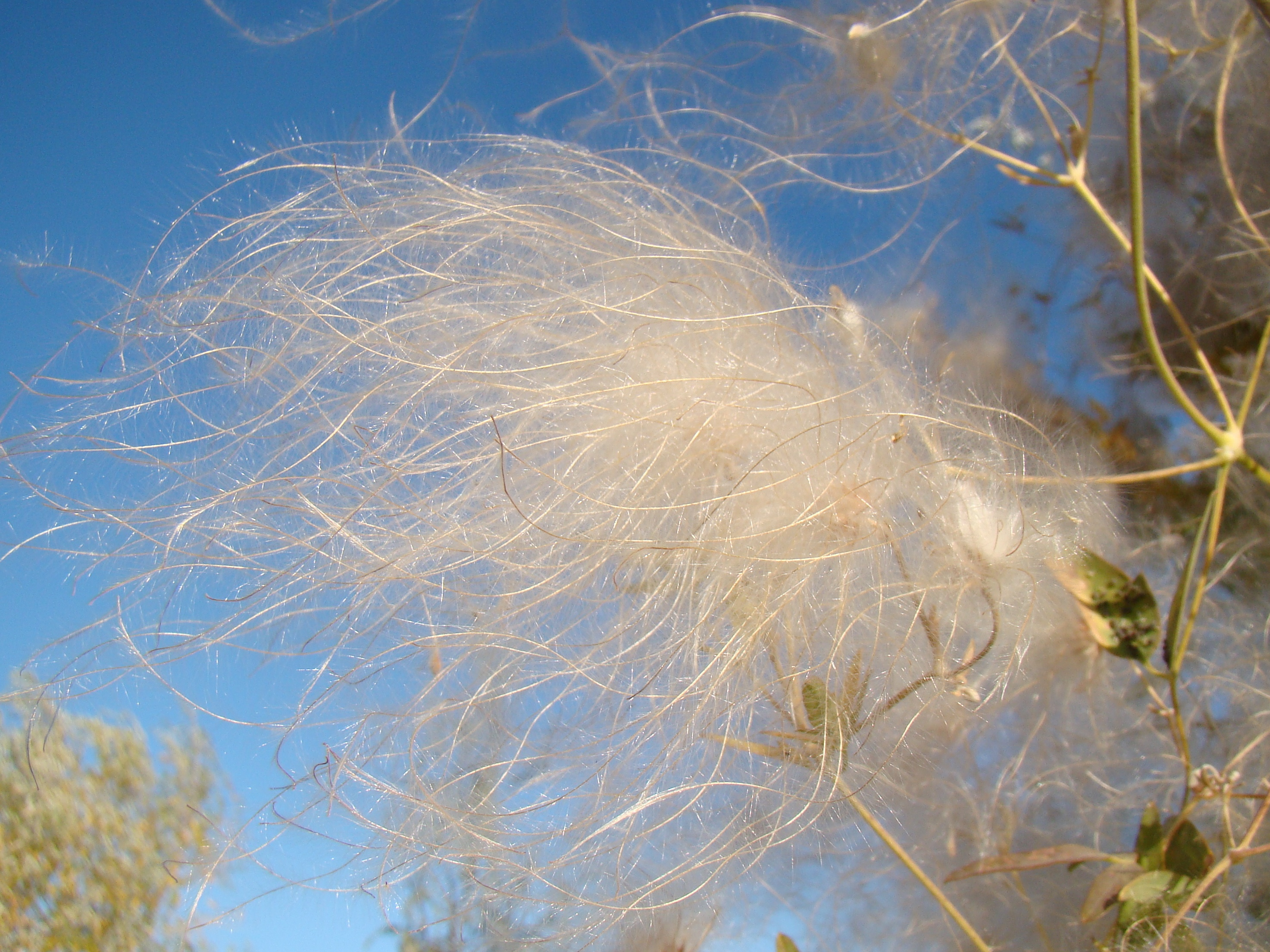 Ломонос восточный (Clematis orientalis). Берег реки Сырдарья, город Байконур, Казахстан.